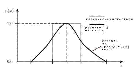 ГРАФИКА-РАЗМИТО МНОЖЕСТВО